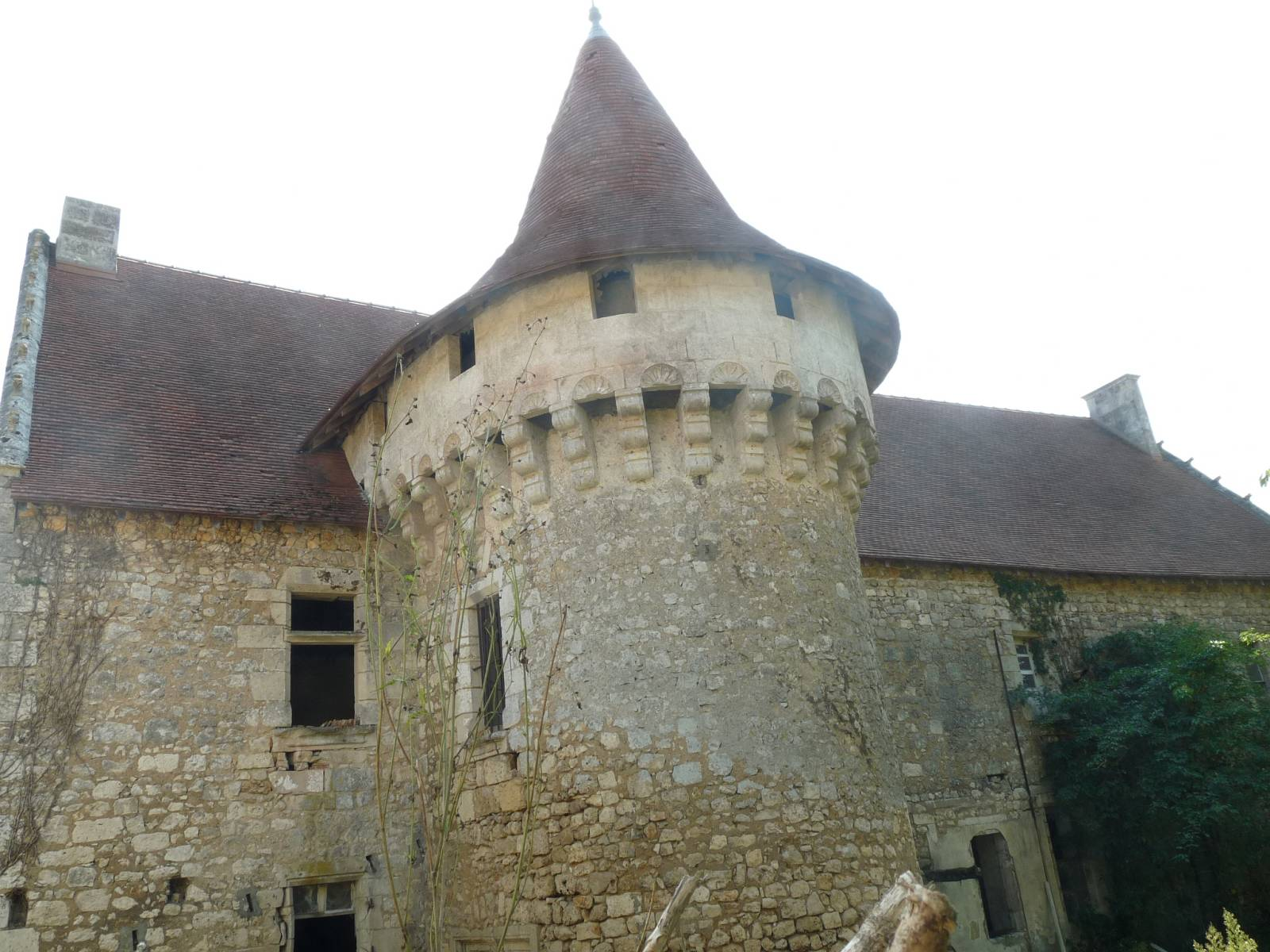 château de Pranzac (16, France)